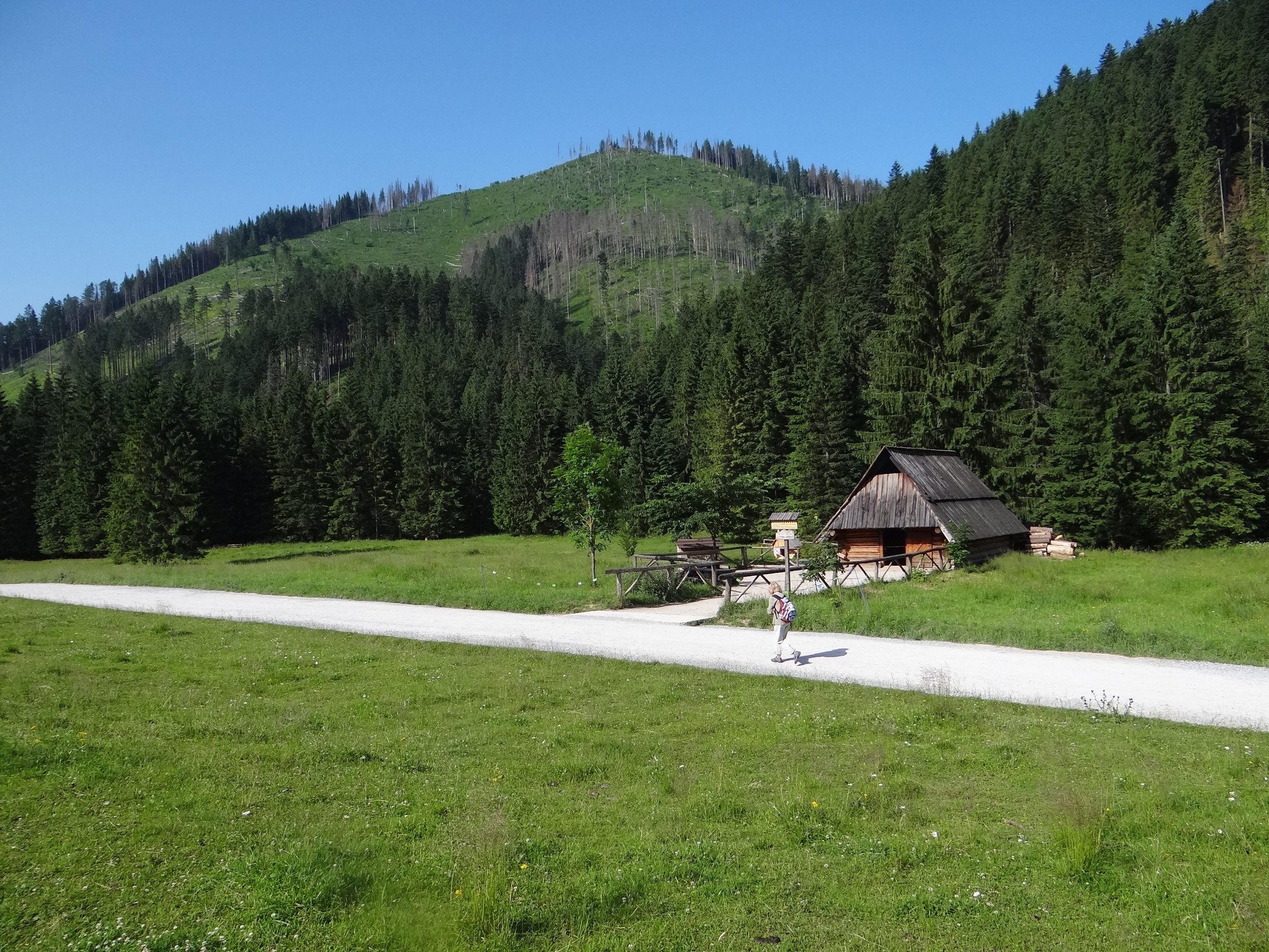 Wyżnia Kira Miętusia. Od lewej:Zadnia Kopka, wylot Wściekłego Żlebu i Pośrednia kopka